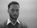 Erik Niedling